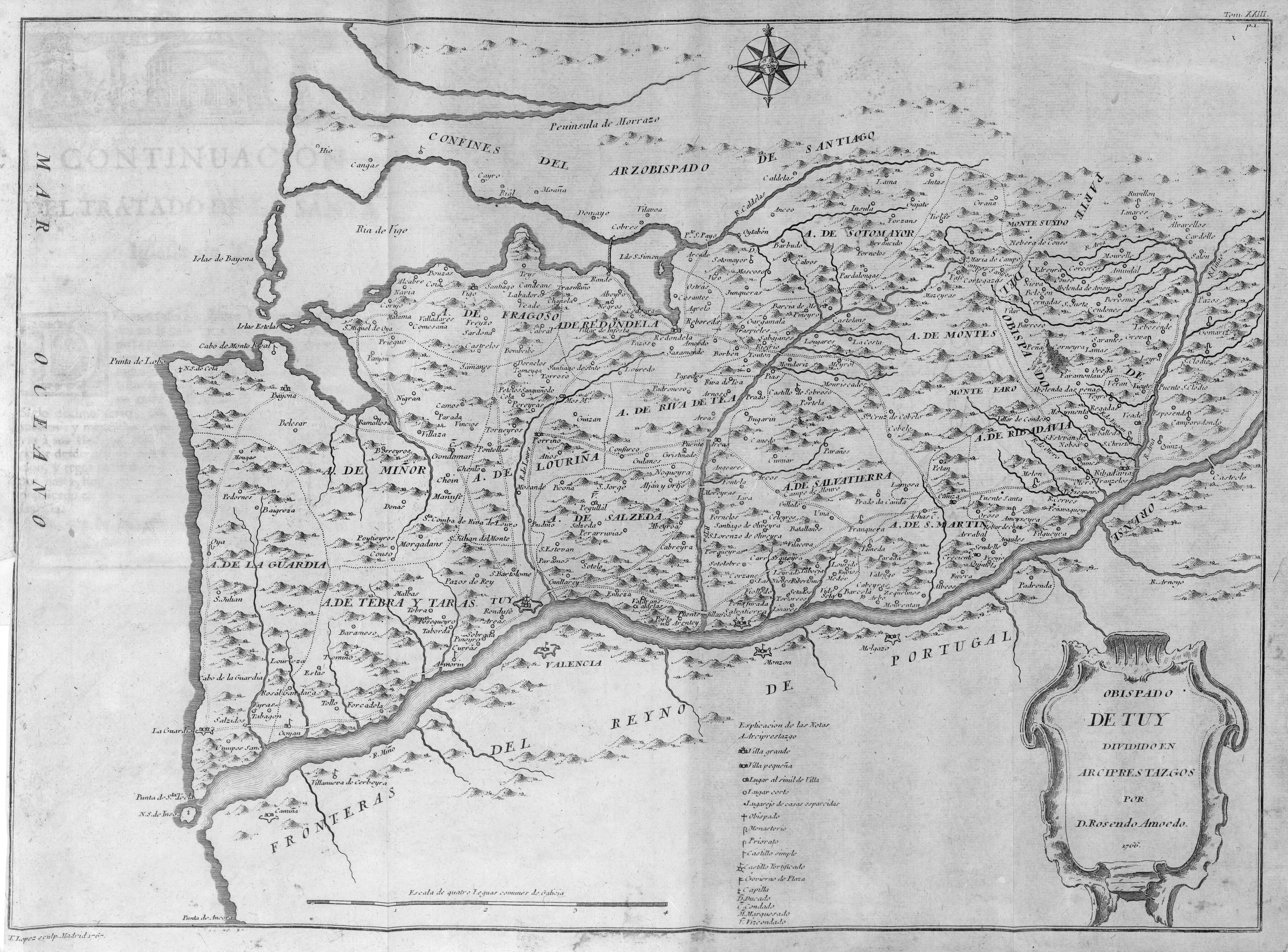 Mapa do bispado de Tui de Rosendo Amoedo.